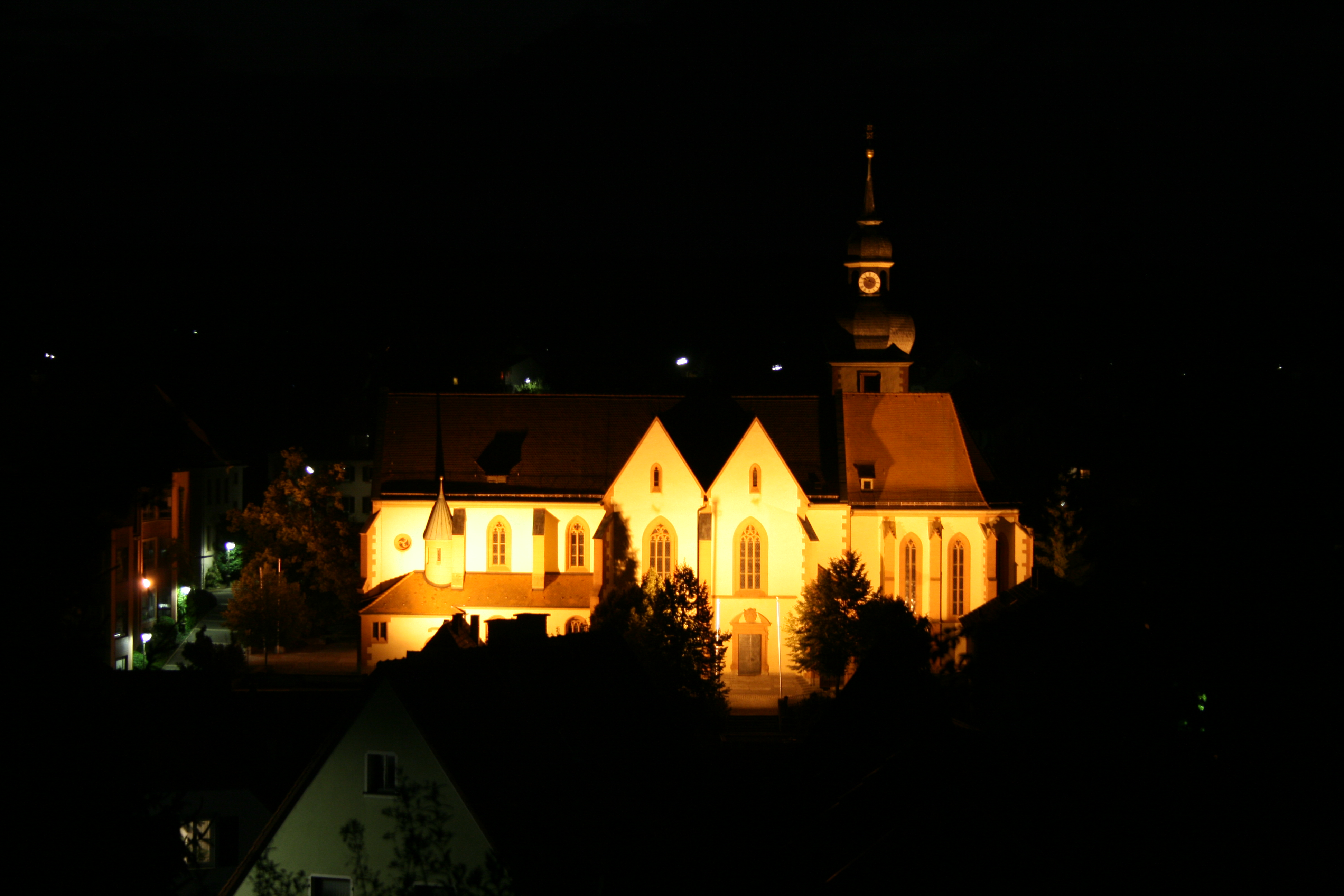 Pfarrkirche Mariae Geburt in Hoechberg